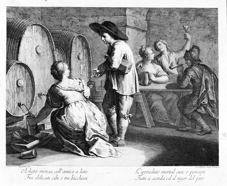 Incisione di Giovanni Volpato esposta al Museo del vino di Torgiano - Italia.